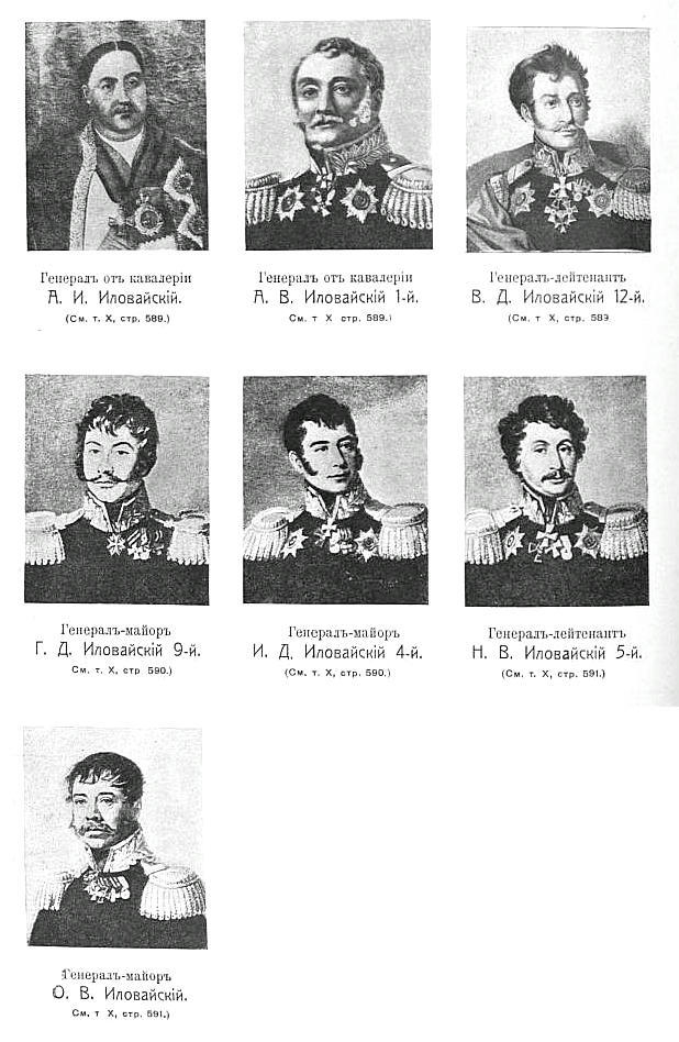 Это изображение было использовано для иллюстрирования статьи «Иловайские» опубликованной в десятом томе «Военной энциклопедии», который был издан книгоиздательским товариществом И. Д. Сытина в 1912—1913 гг. в столице Российской империи городе Санкт-Петербурге.